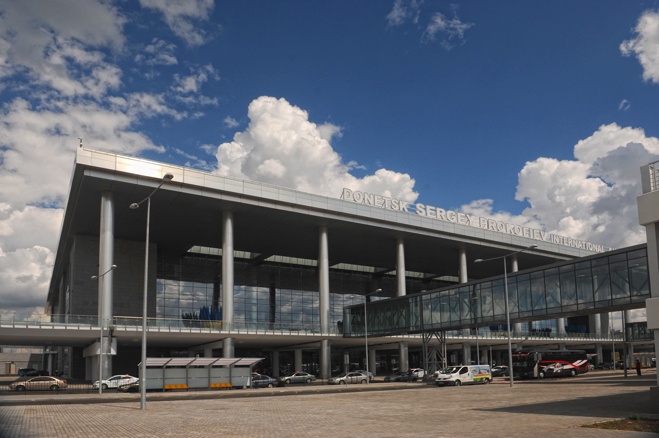 Donetsk Airport